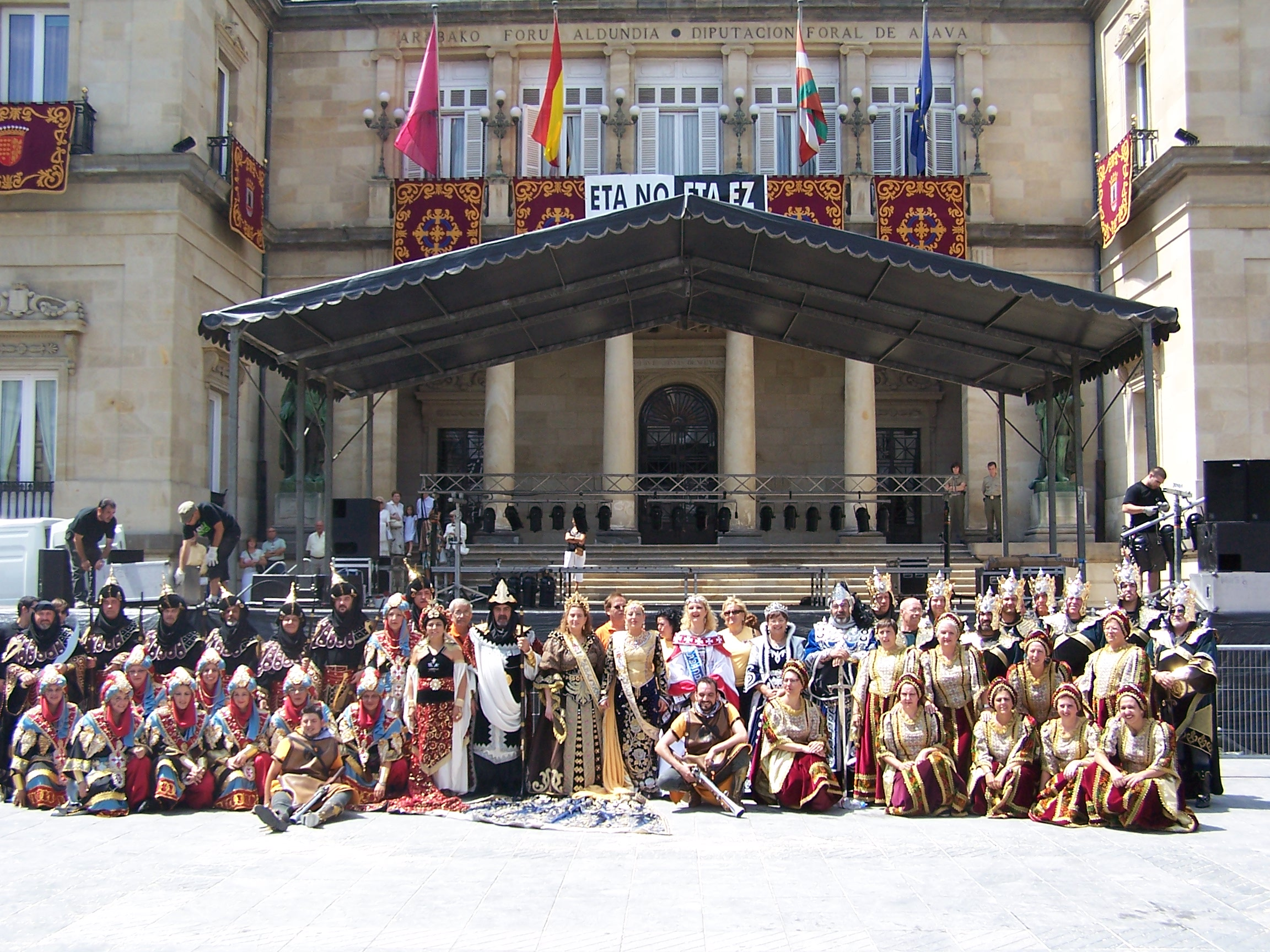 Festeros de Alicante en Vitoria-Gasteiz, durante la Blanca '06.